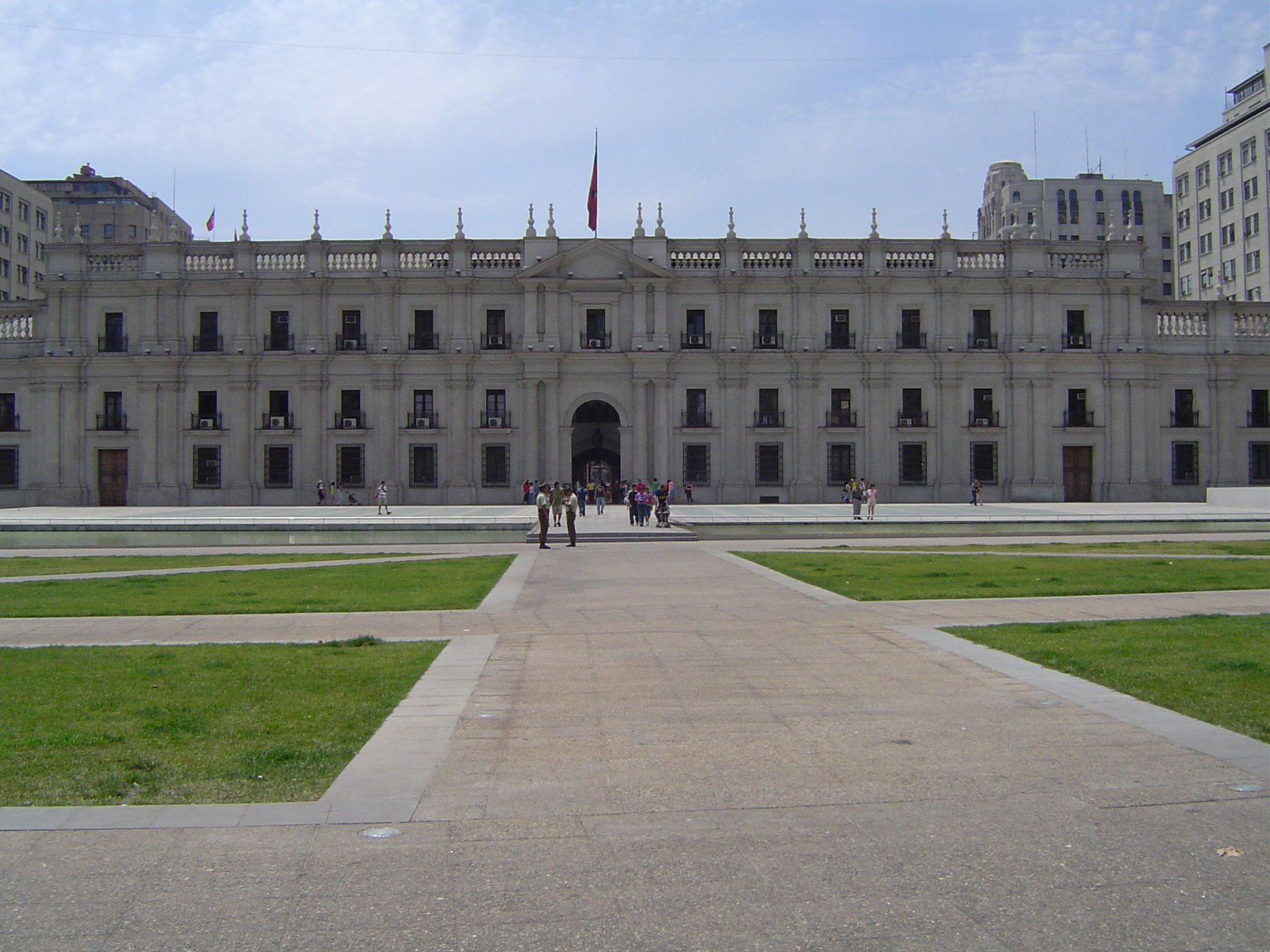 Plaza de la Ciudadanía in front of La Moneda Palace, Santiago de Chile